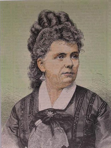 Therese Vogl, königlich bayerische Hofsängerin, teilkolorierter Holzstich, ca. 14 x 11 cm